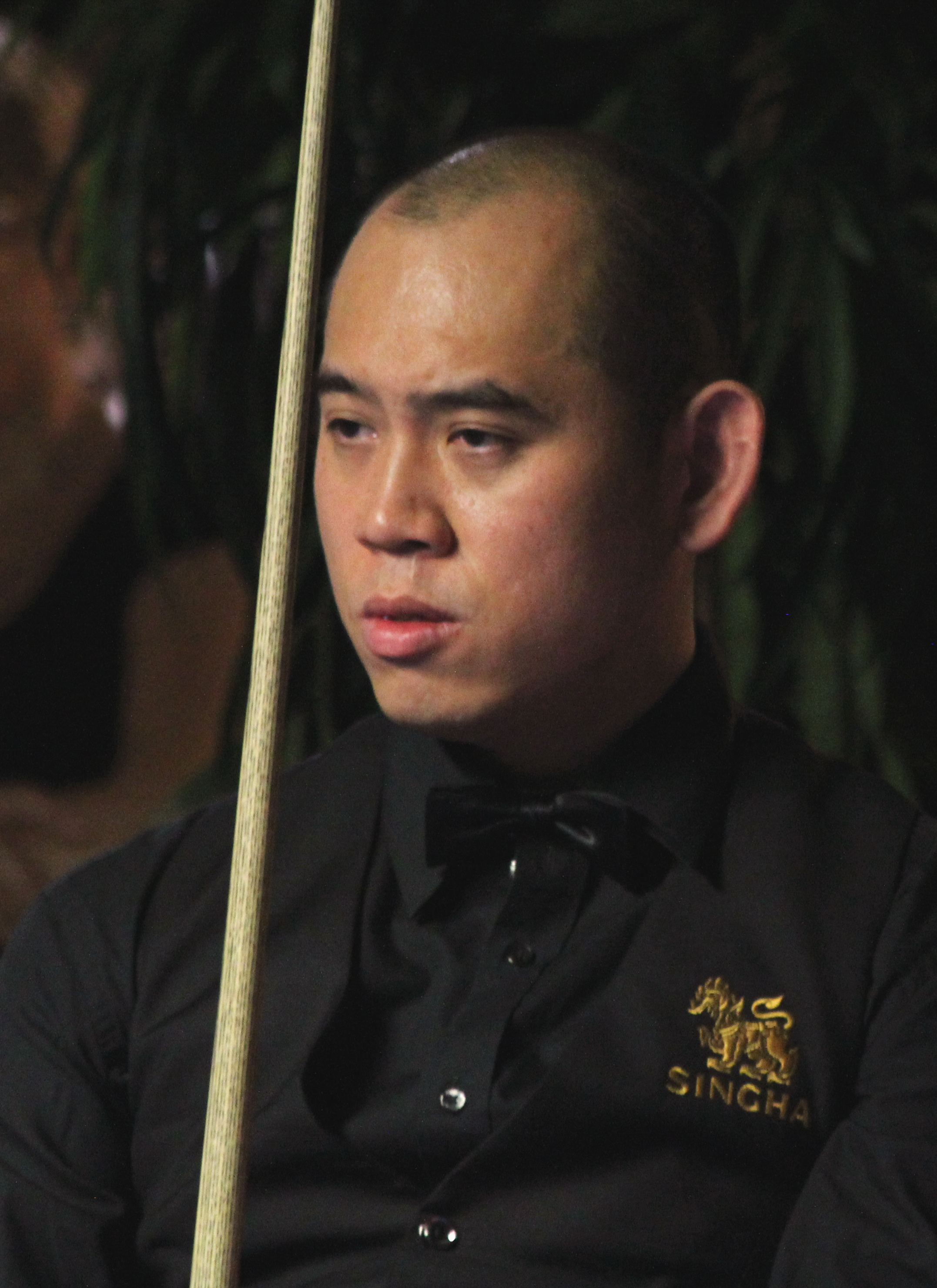 Dechawat Poomjaeng beim Paul Hunter Classic 2016